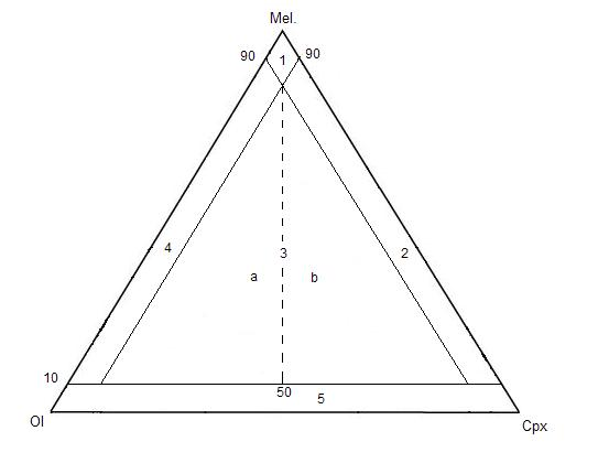 Ponumerowany schemat skał melilitowych intruzywnych wg klasyfikacji IUGS.